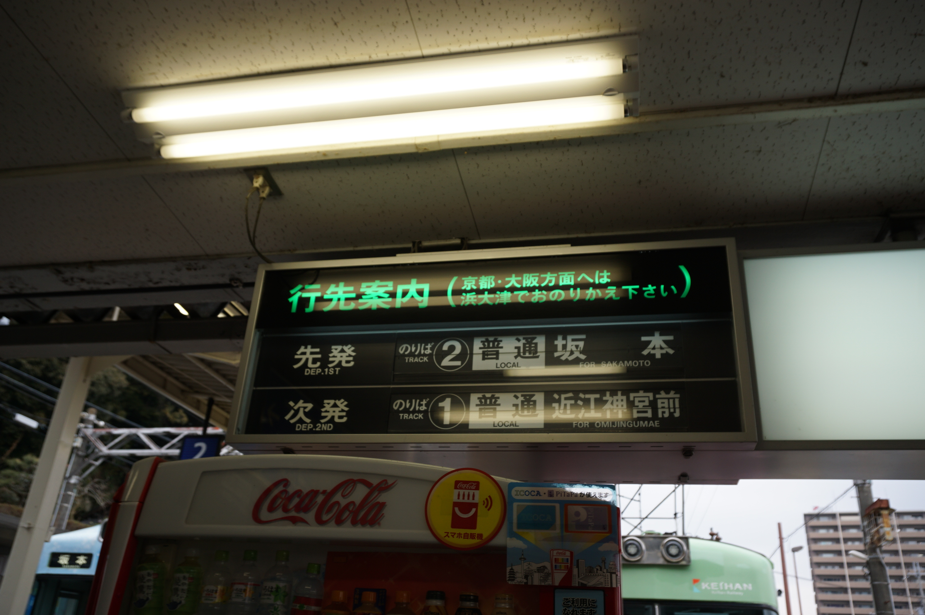 2018年現在京阪で唯一残るパタパタ式発車標